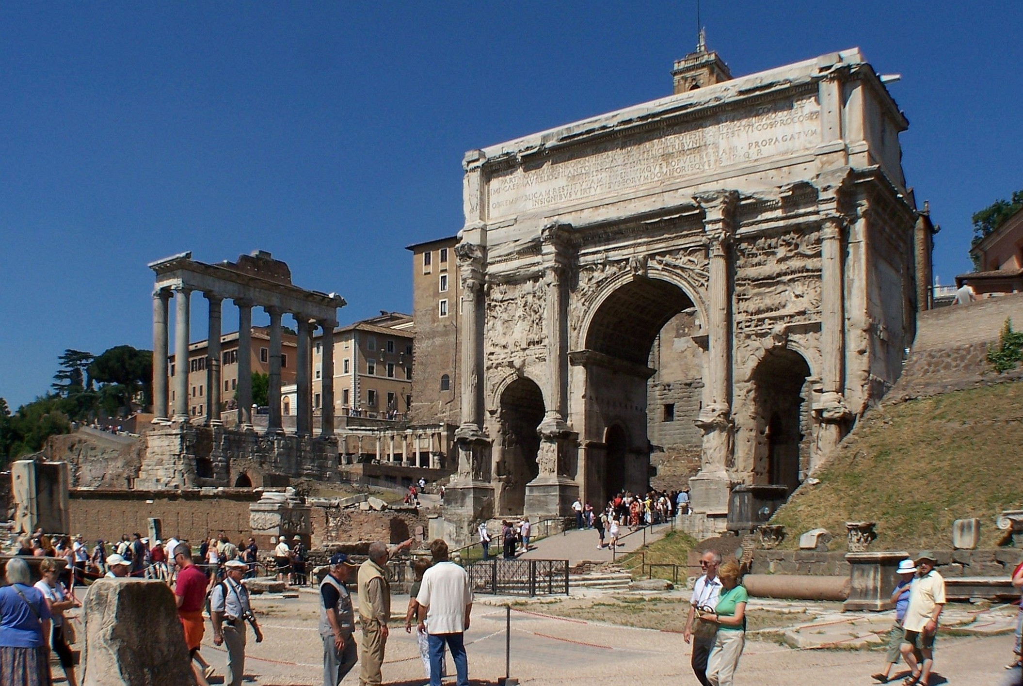 Forum Romanum, Triumphbogen des Septimius Severus